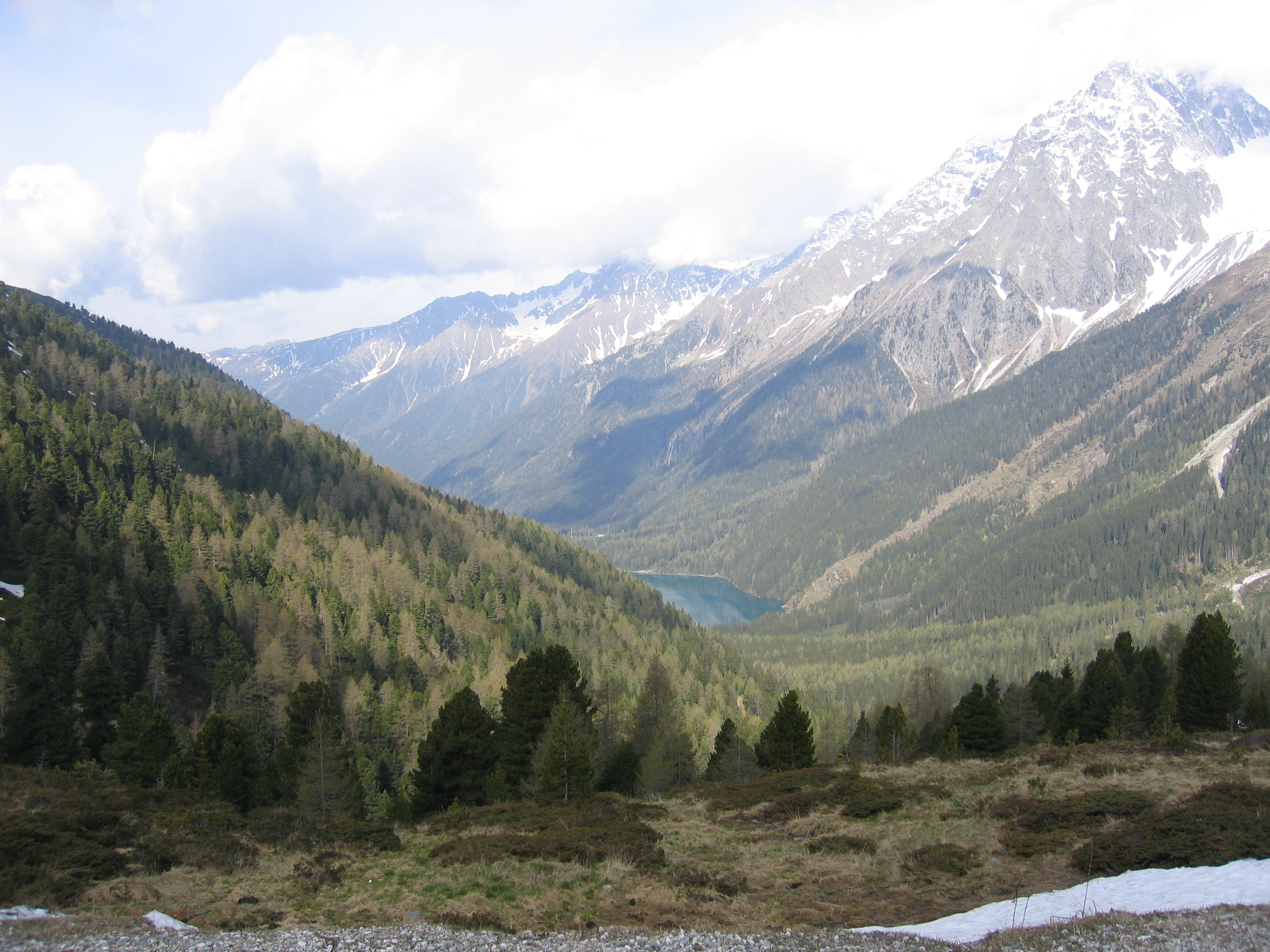 Blick vom Staller Sattel ins Antholzertal, Antholzer See, ganz rechts der Wildgall (3272 m)